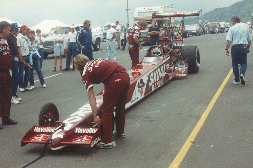 Don Prudhomme, Denver 1996Don Prudhomme